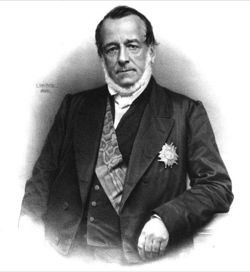 Paul Boudet, homme politique français, ministre, gravure.